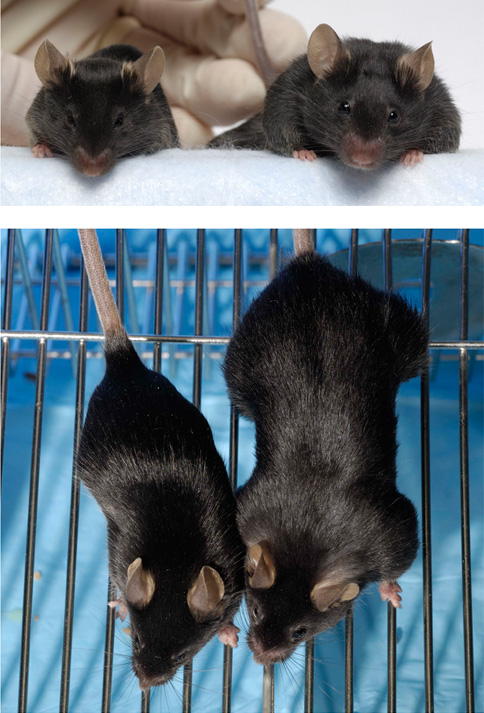 Wildtyp Maus (links) und transgene Maus -/- Mstn F66 (rechts). Bei der rechten Maus wurde das Mstn-Gen abgeschaltet und dafür das Follistatin-Gen eingefügt. Die Muskelmasse der rechten Maus ist um den Faktor 4 höher, als beim Wildtyp (links)